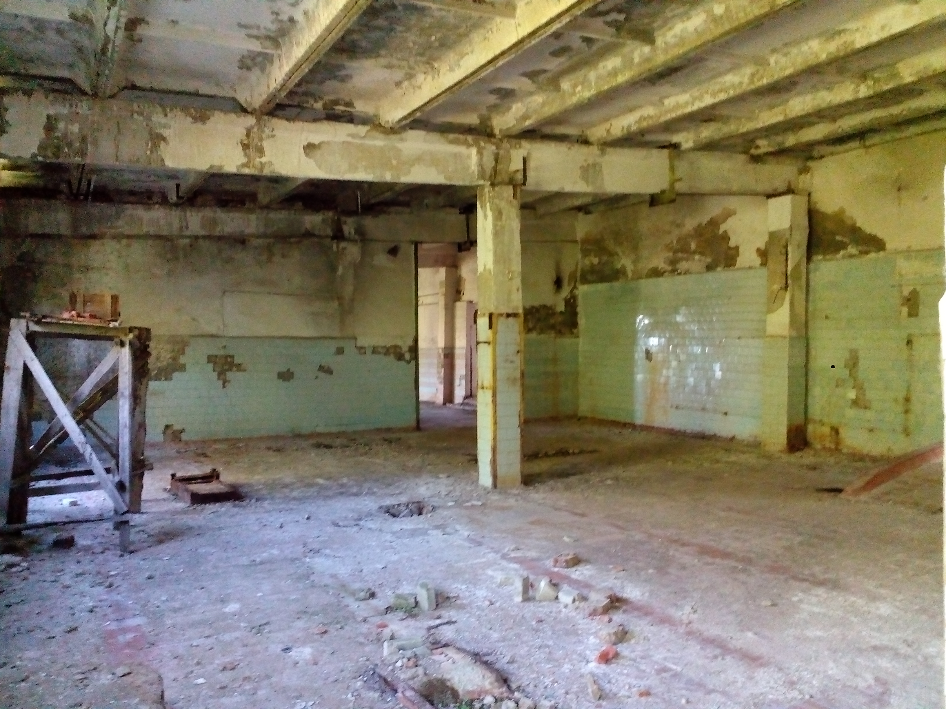 Заброшенный мясной цех винно-консервного завода в селе Горелое.